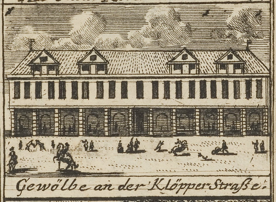 Gewölbe an der Klöpperstraße (Jungfernstieg an der Neuen Straße) in Braunschweig Anfang des 18. Jahrhunderts nach Johann Georg Beck.